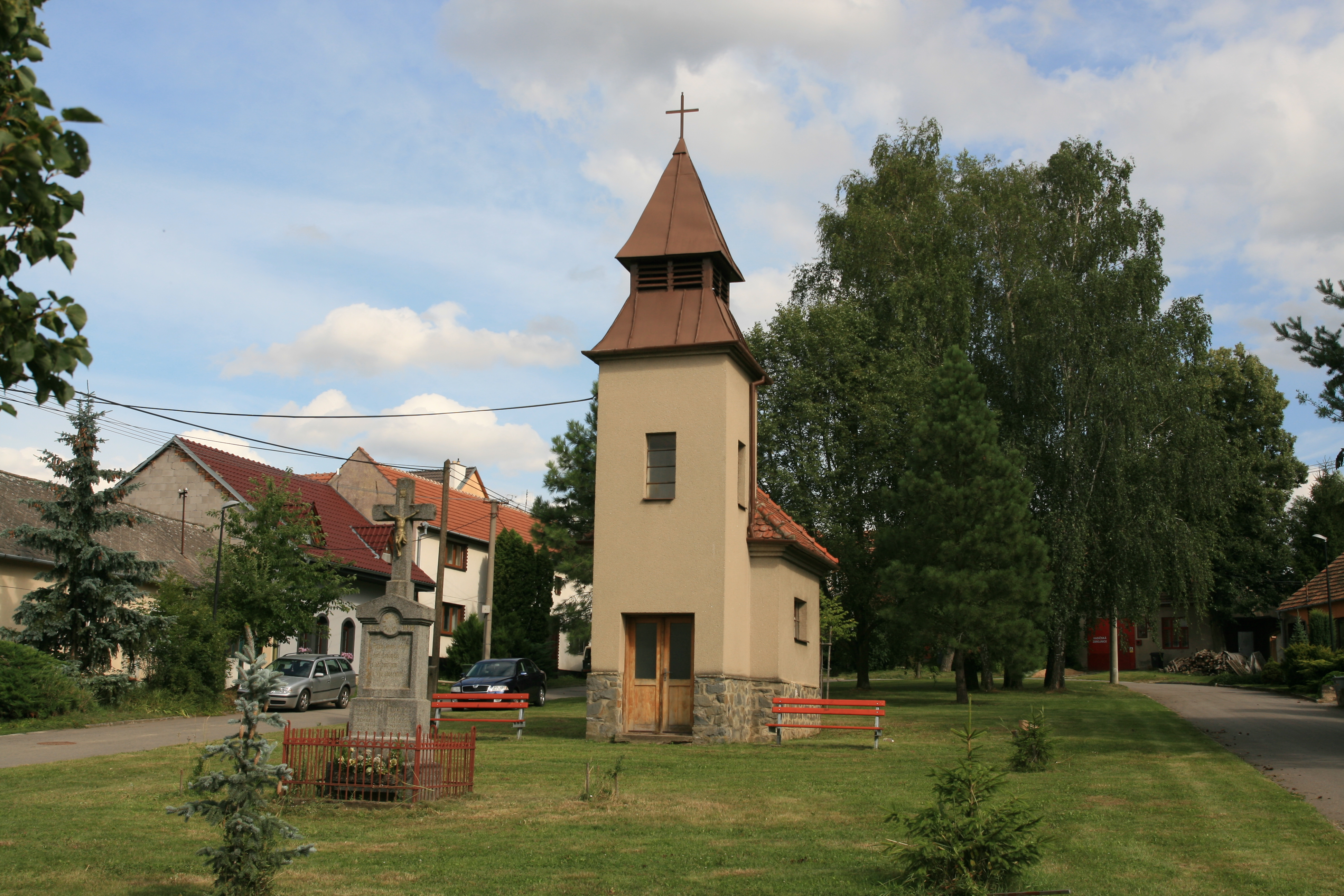 Vesnice Černčín, městská část Bučovic v okrese Vyškov. Kříž a kaple na Marečkově náměstí.